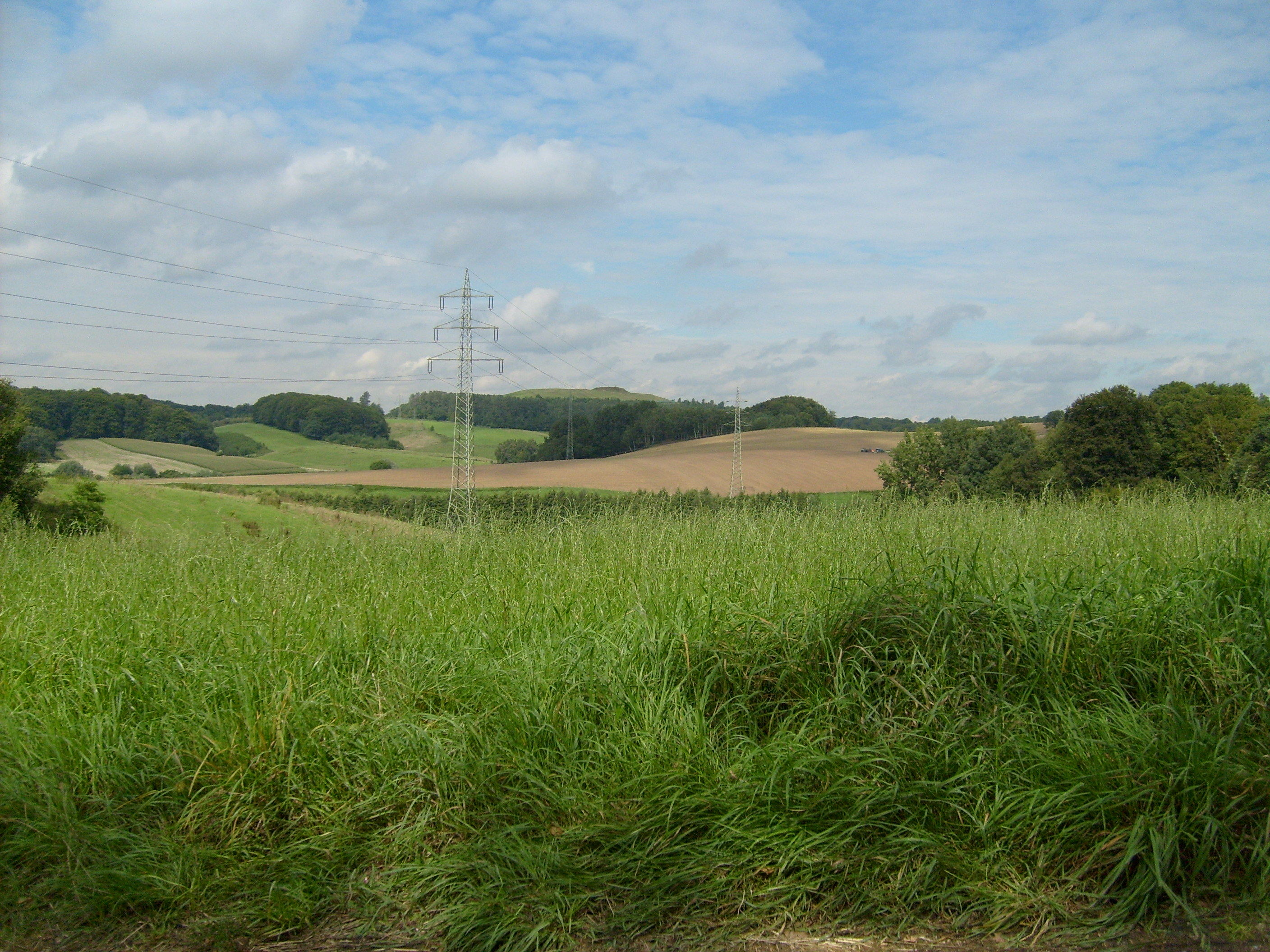 Alt-Erkrath - Blick nach Nordwesten; im Bild mehrere Landschafts- und Naturschutzgebiete (Vordergrund im LSG „Stinderbachtal“ in Erkrath, dahinter Ackerflächen im LSG „Terrassenlandschaft“, des Weiteren Teilbereiche der NSG „Hubberather Bachtal“ in Erkrath bzw. Düsseldorf, LSG „Stadtgebiet Düsseldorf“…); 110-kV-Freileitung (Bl. 0746)